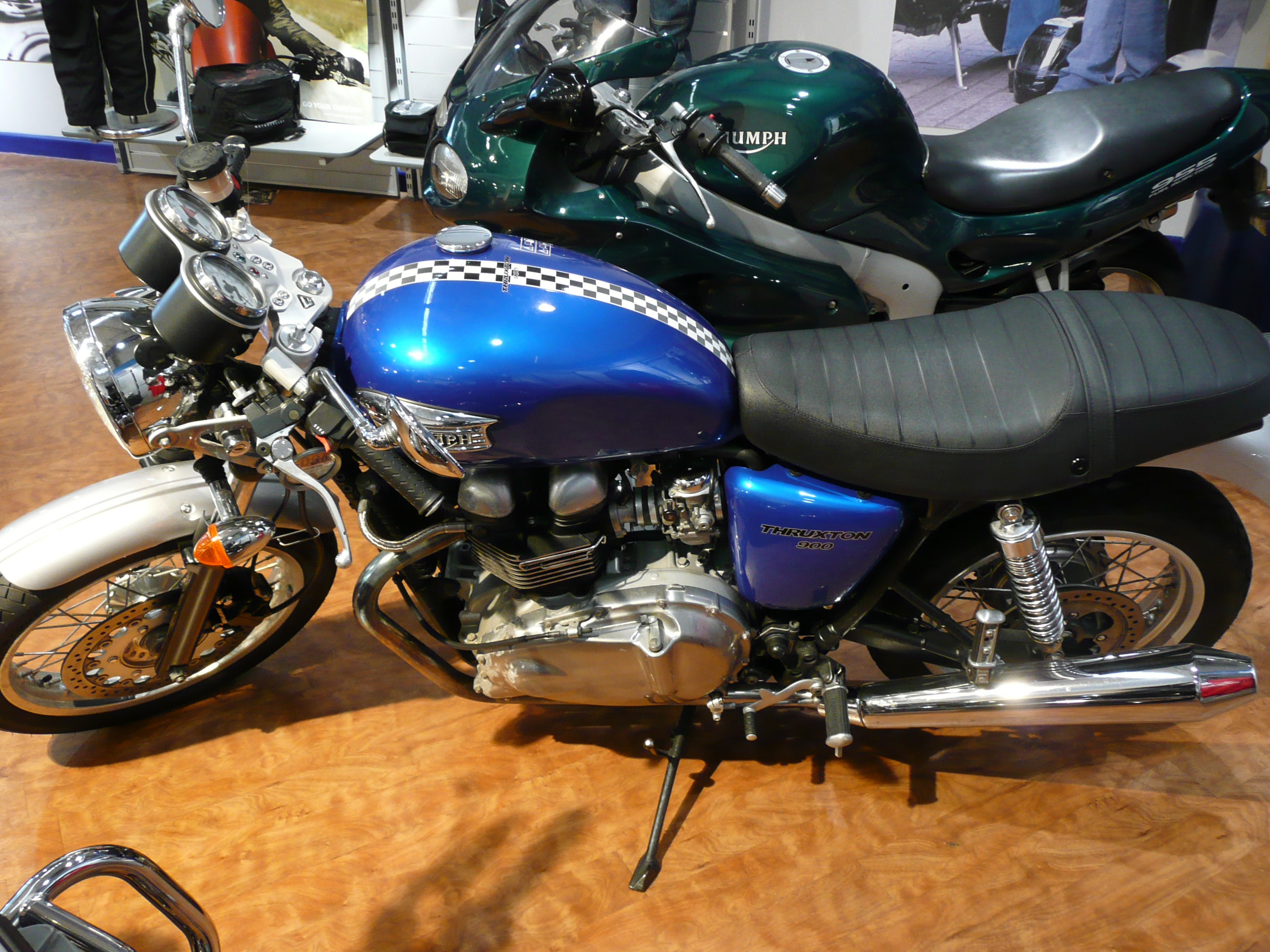 Triumph Thruxton 900 2008